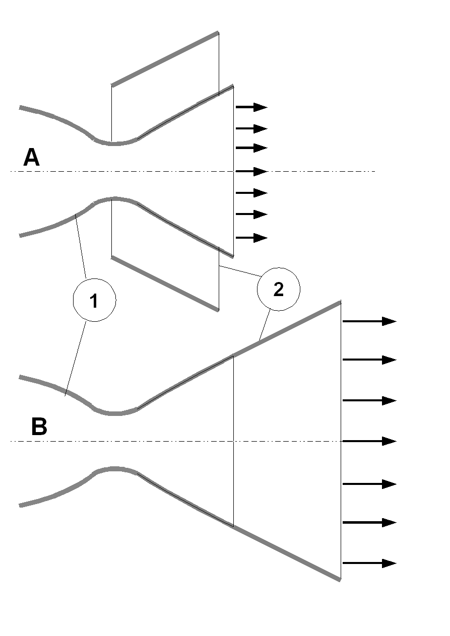 Lo schema della testa dell'ugello, ottimizza l'ugello Laval a diverse quote. (1) - ugello, (2) - allegati ugelli, A - posizione della testa nel mondo; B - posizione della testa all'altezza della.